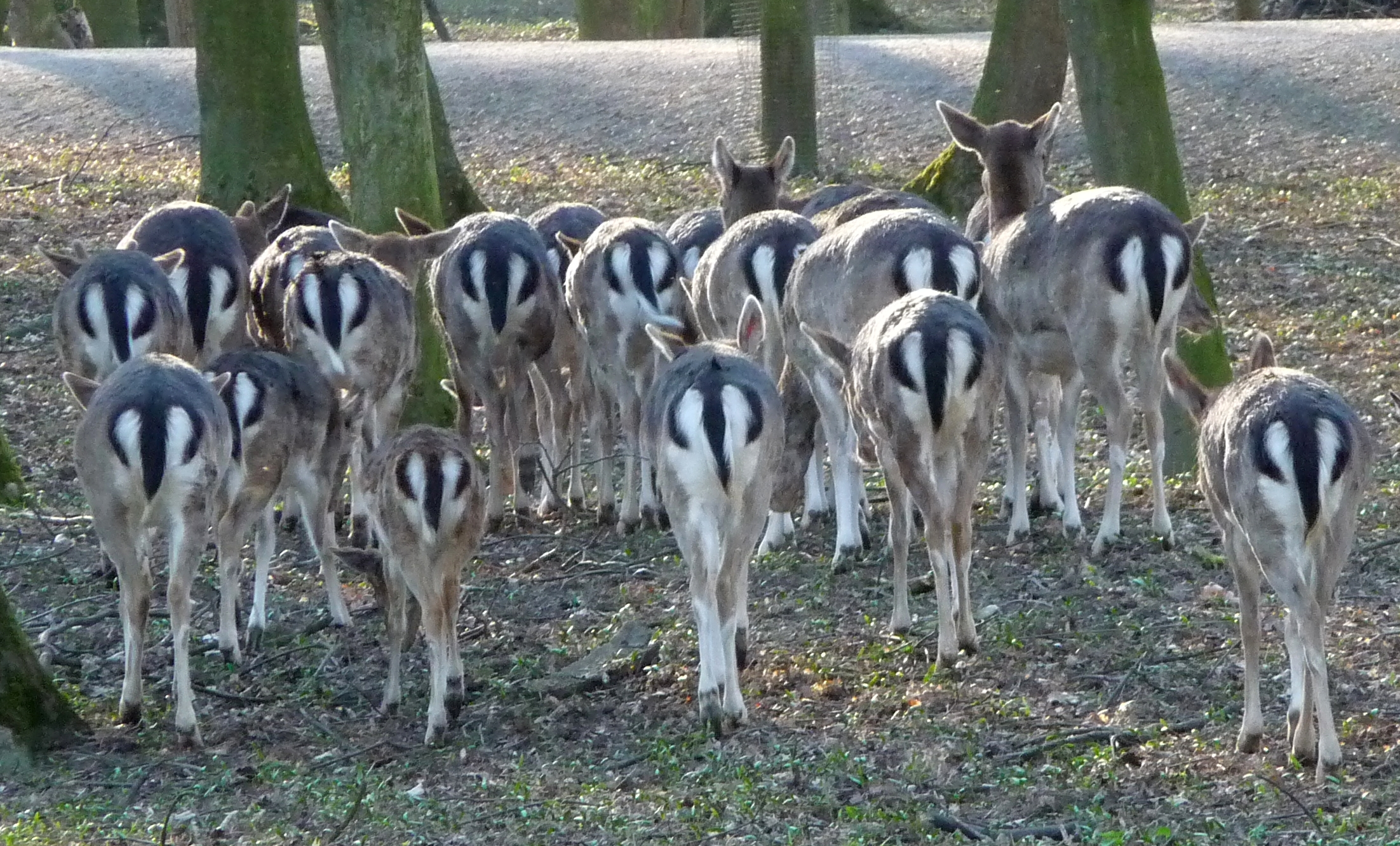 Gruppe Damhirsche (Dama dama), fotografiert im Wildpark Ludwigshafen-Rheingönnheim (Rheinland-Pfalz, Deutschland)